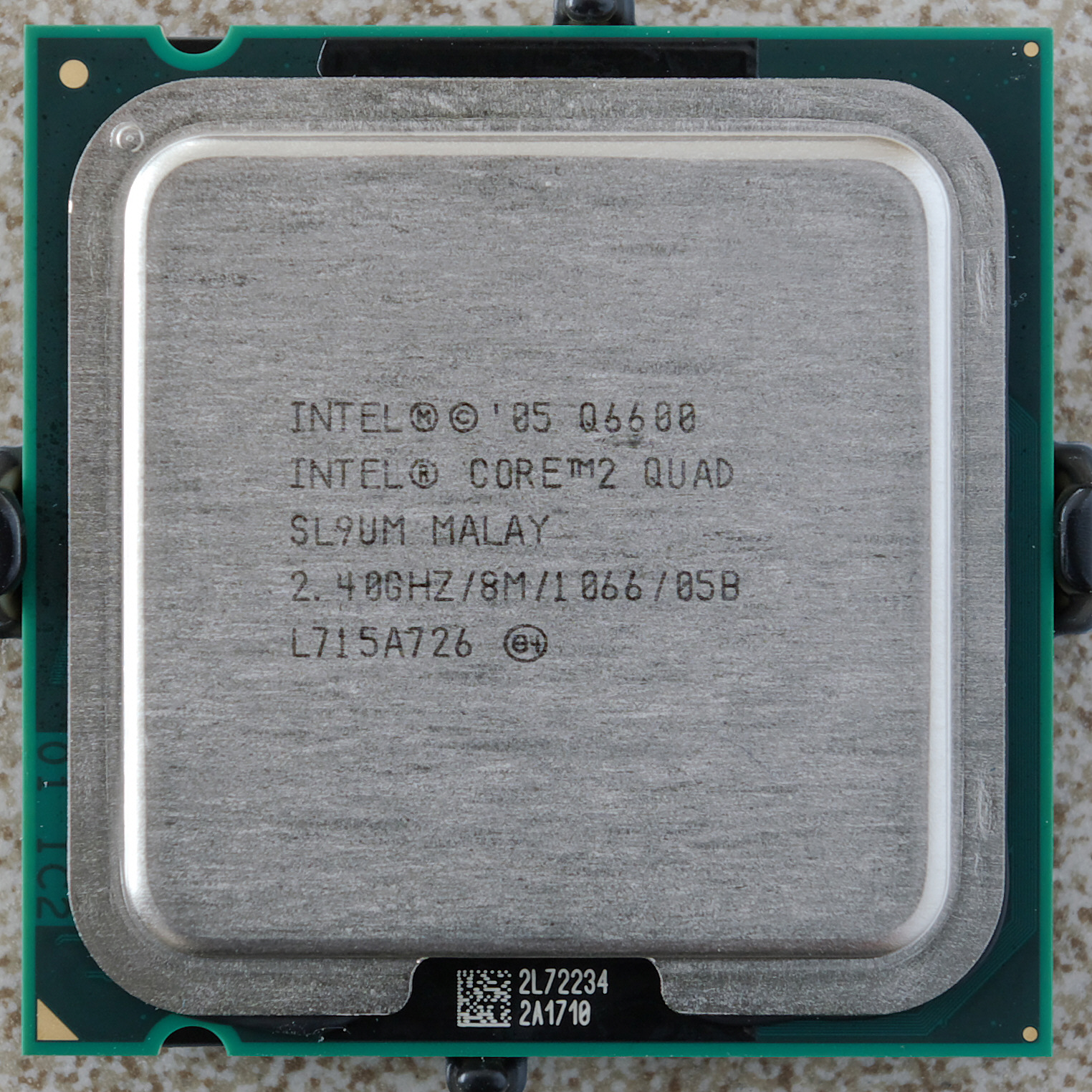 Intel core2 quad 6600 LGA775